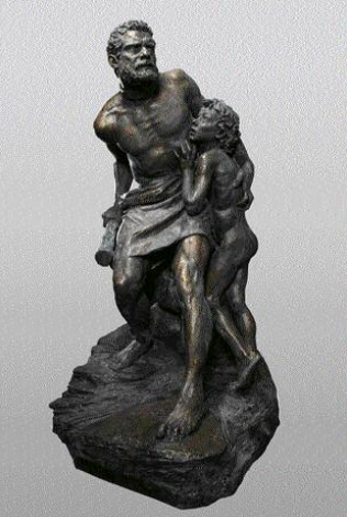 Скульптурная группа "Беглый раб" - художник Владимир Александрович Беклемишев